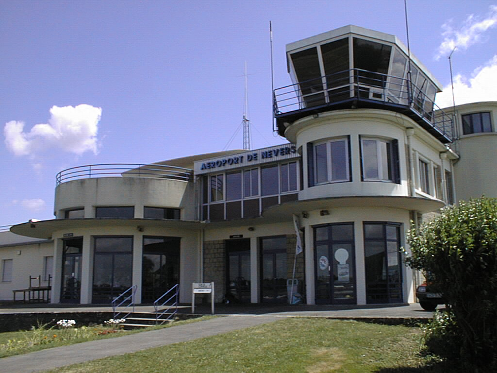 Façade de l'aéroport de Nevers-Fourchambault, Nièvre, France.